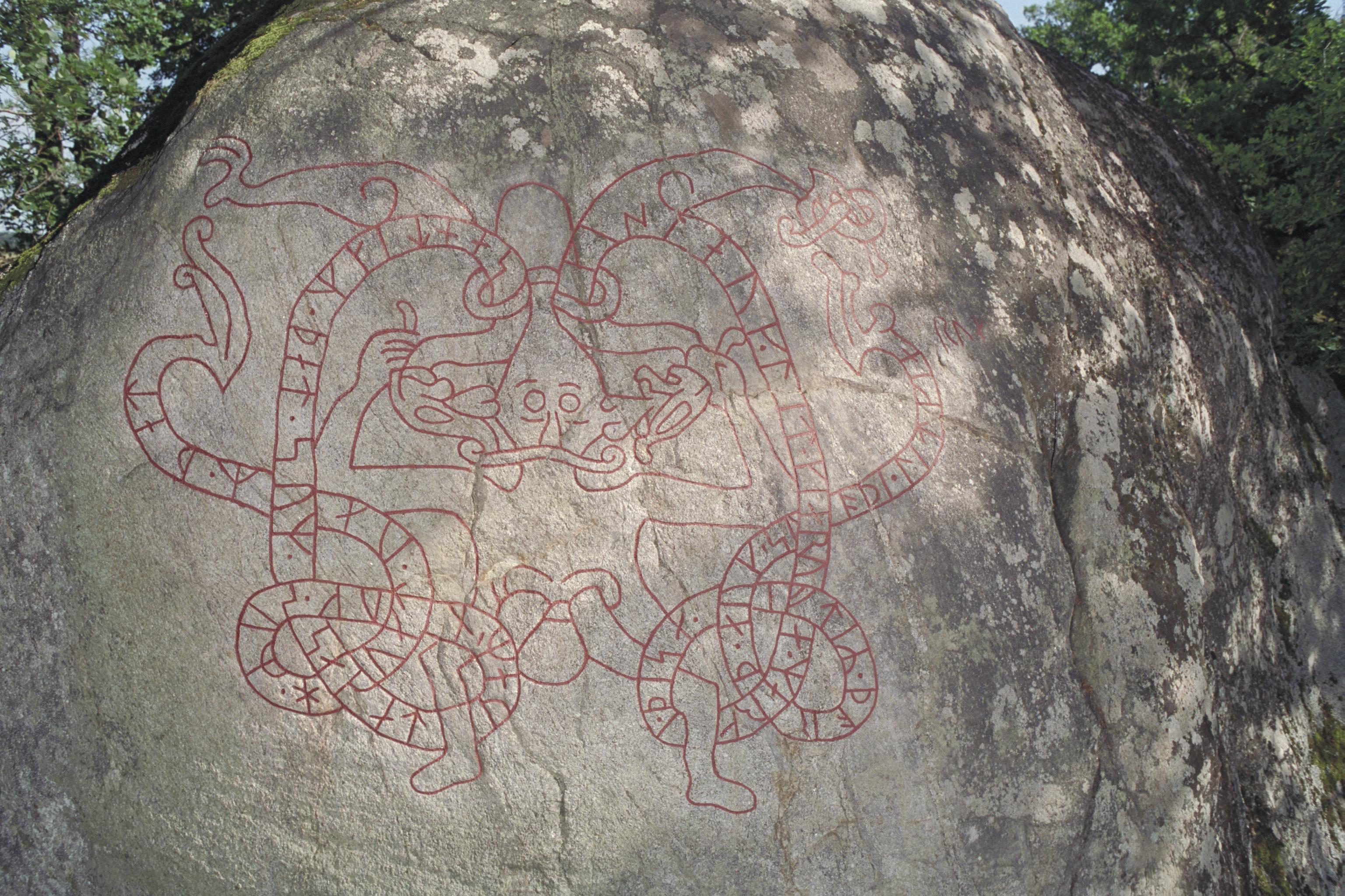 Inskriften på runblocket lyder: Gislög lät göra dessa märken efter Tord; också Slode lät göra dem. Sant är det såsom det blev sagt och såsom det blev tänkt.